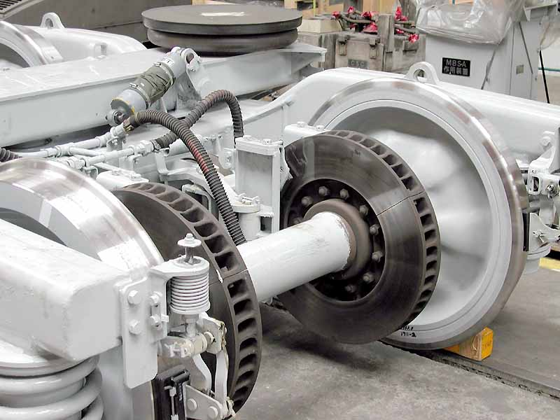 京急1500形電車の付随車・サハ1900形に装備されているTH1500T台車のディスクブレーキ。ブレーキディスクは自動車でいうベンチレーテッドディスクを採用している。 2003年5月25日、京急ファインテック久里浜事業所（一般公開日）にてComyu撮影。